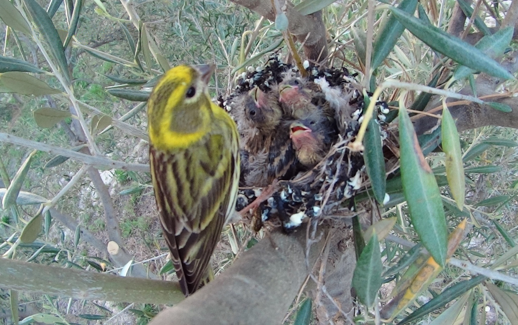 aves y pajaros